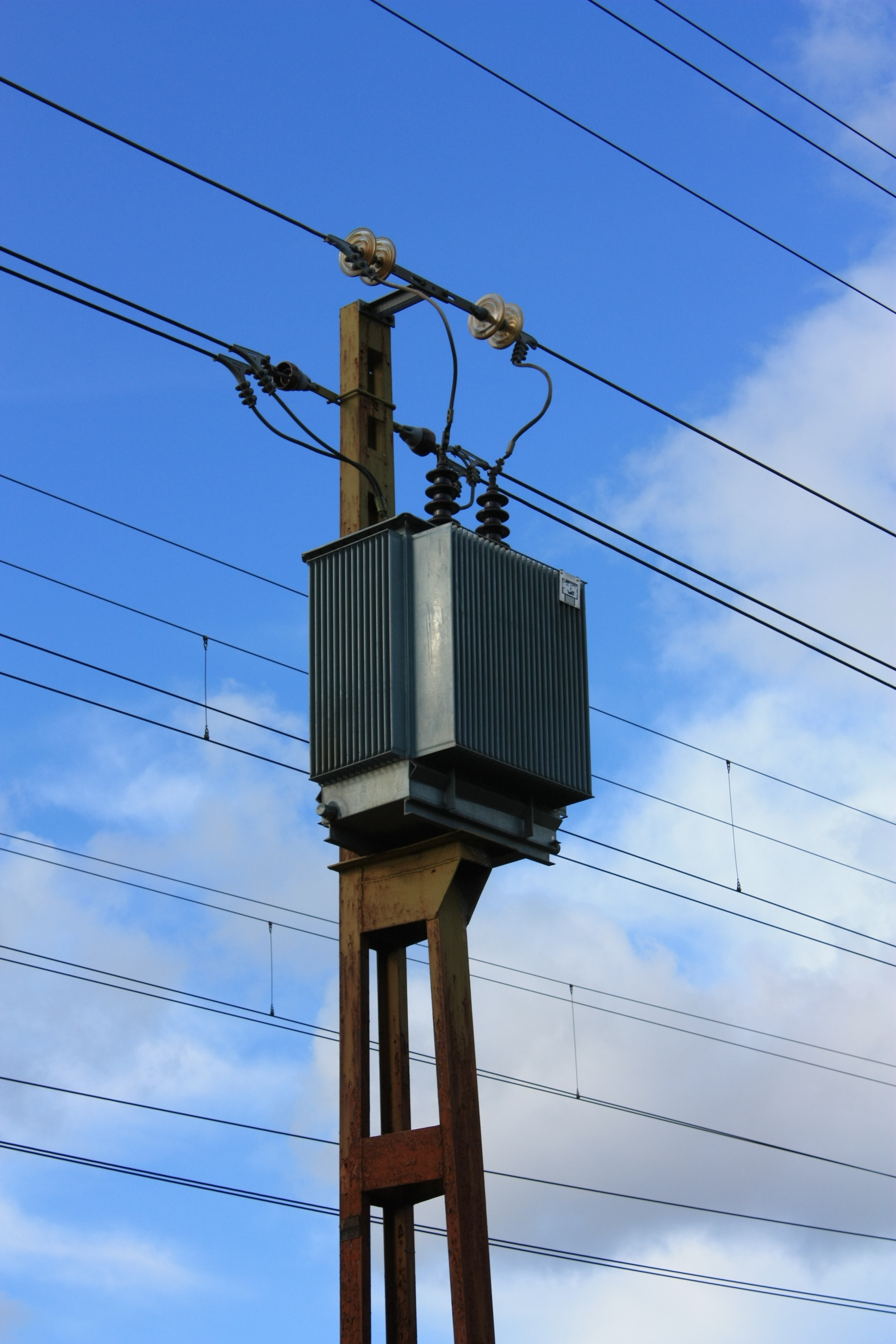 Sugtransformator av den nya typen. Den finns i närheten av Lindekullen strax söder om Mjölby på Södra stambanan.